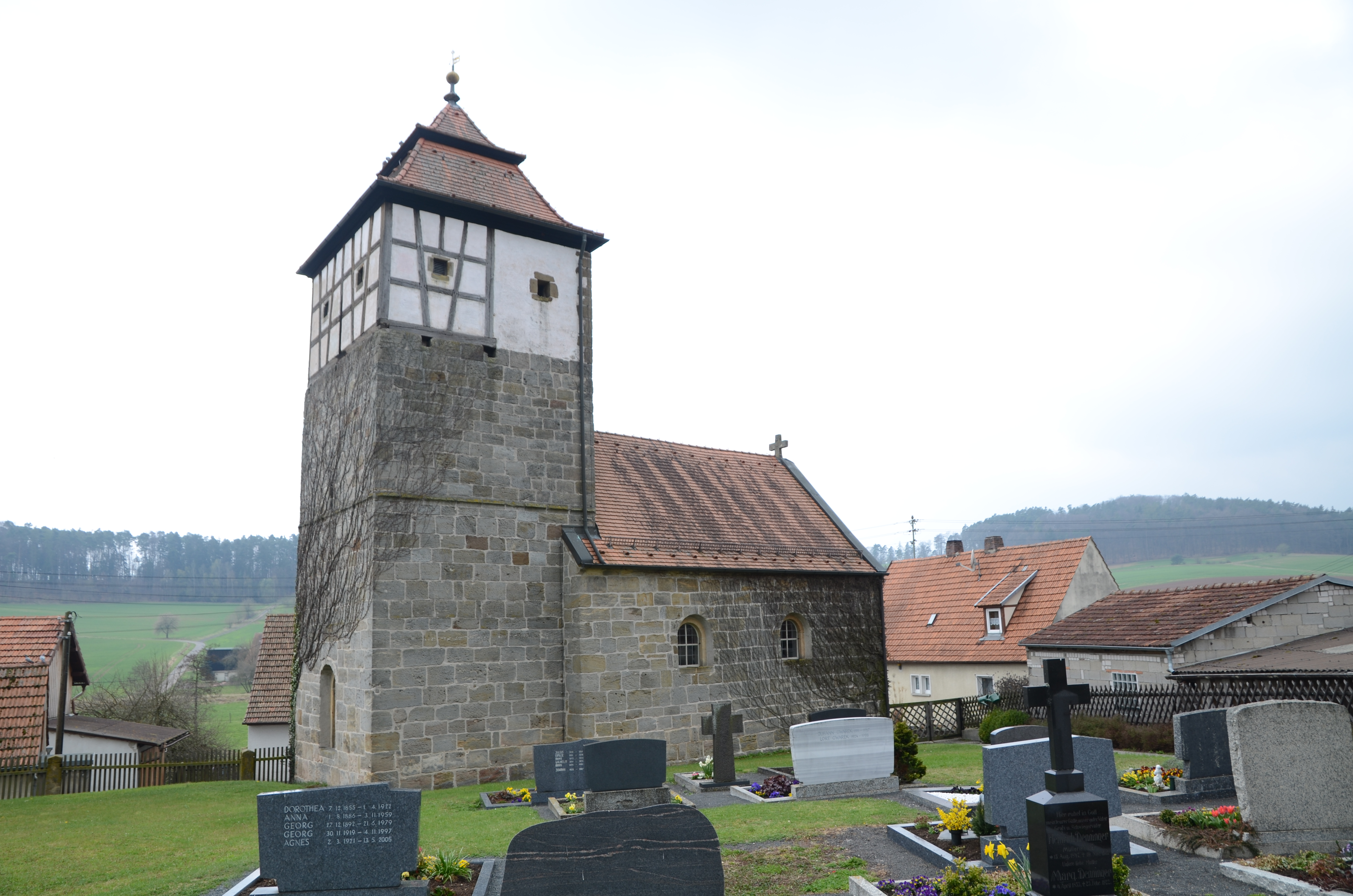 evang.-luth. Kirche in Junkersdorf an der Weisach